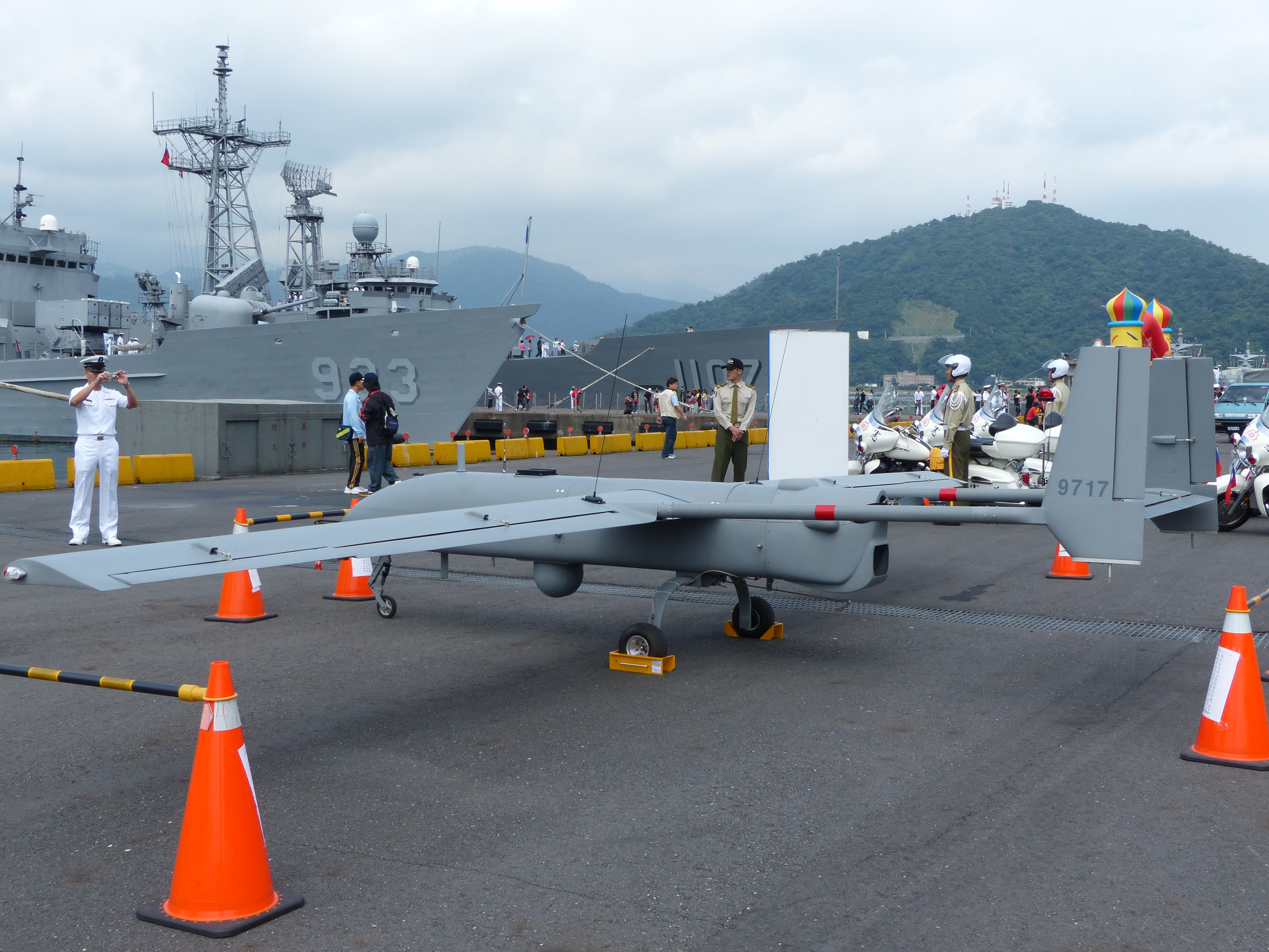 2013年中正軍港營區開放活動，11號碼頭展示的銳鳶無人機9717左後方。